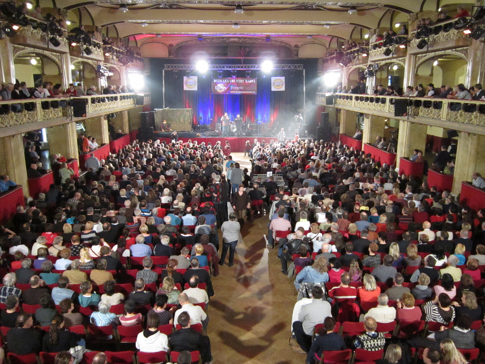 Česky: Velký sál Lucerny před začátkem koncertu country a folkových skupin Dvorana Country rádia